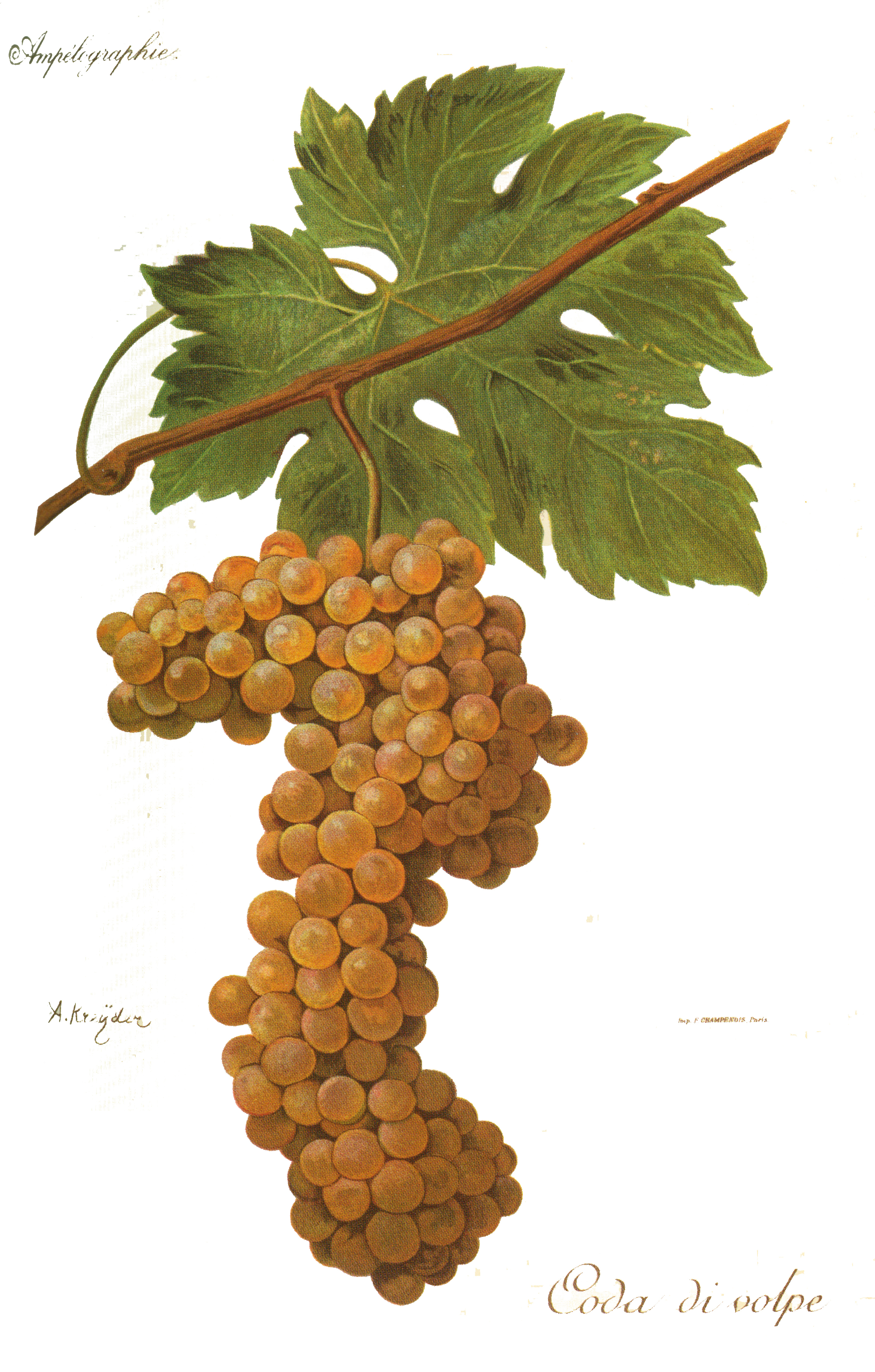 Coda di volpe w L'Ampélographie Viali i Vermorela (1901-1910)